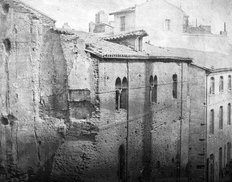 Toulouse (Haute-Garonne, France) - Vue d'une maison des Moulins du Château Narbonnais. Les fenêtres du dernier étage ont été conservées et sont exposées au Jardin des Plantes.